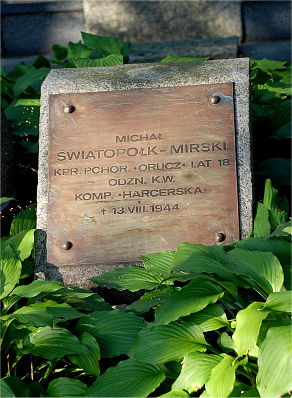 Michał_Światopełk-Mirski - grób na Powązkach Wojskowych w Warszawie